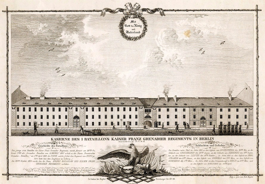 Kaserne des I. Bataillons des Kaiser Franz Grenadier-Regiments in Berlin, Kommandantenstraße. Die Kaserne wurde von 1752 bis 1753 für die Regimenter Braun und Lettow in der damaligen Scheunengasse errichtet. Ab 1815 wurde sie vom Kaiser-Franz-Regiment genutzt, bis zum Umzug des Regiments 1866 in die Blücherstraße. Stahlstich